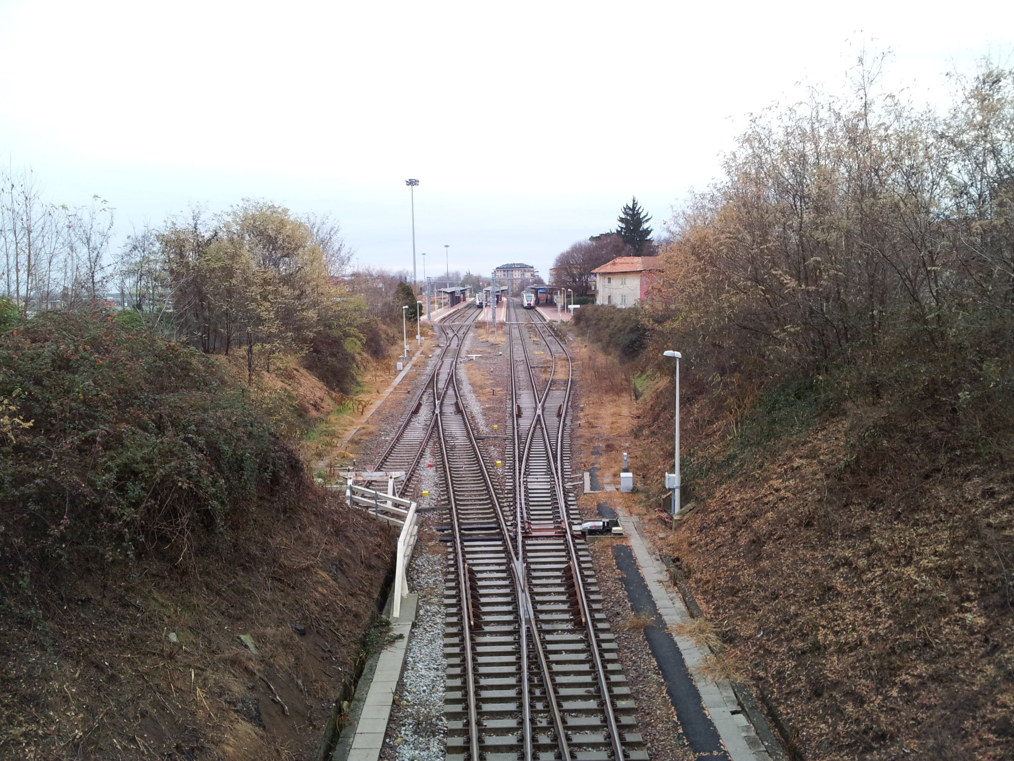 Stazione lato binari, in direzione Santhià, ripresa dal cavalcavia in Via Piave (vista dalla direzione di Novara).